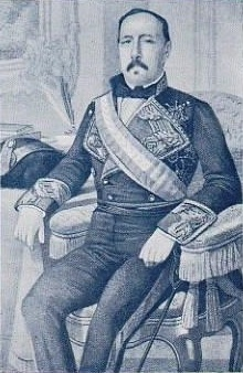 Don José Martínez Tenaquero. Jefe de Estado Mayor de D. Carlos de Borbón en la última guerra carlista.